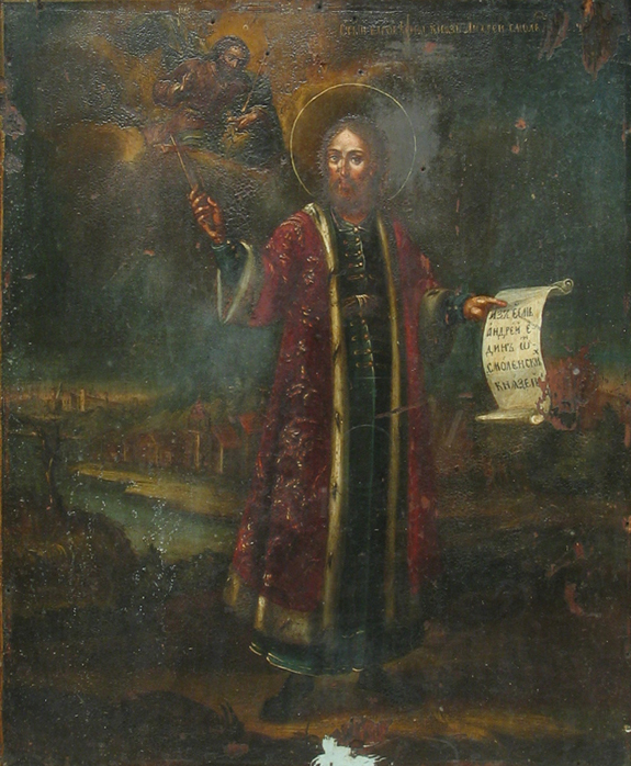 Икона «Святой Благоверный князь Андрей Смоленский (Переяславский)». Россия, середина XIX в. Дерево, масло. 33 х 26,5